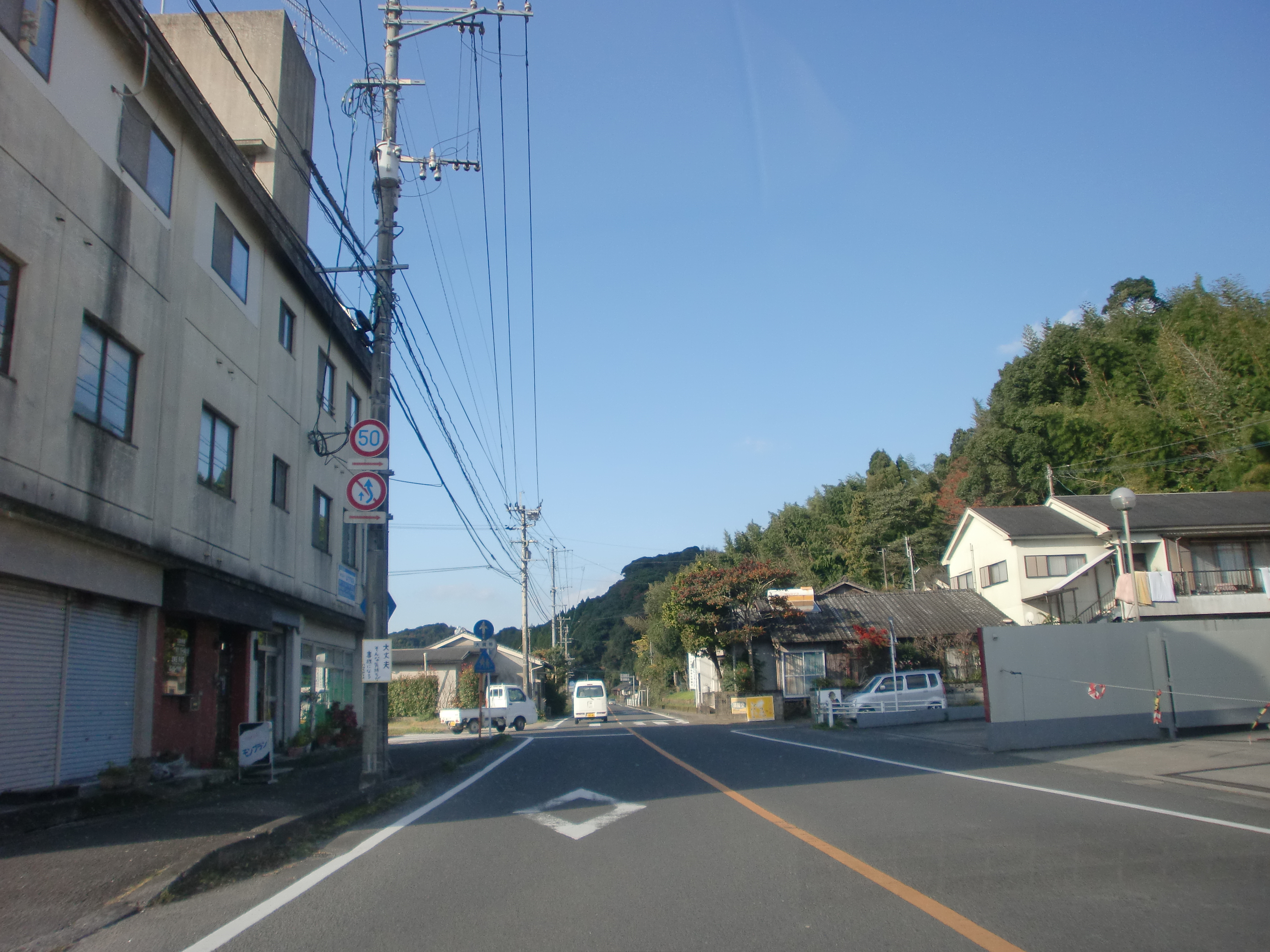 鹿児島県道339号東郷西方港線の起点である田海町交差点から西方町方面を望む